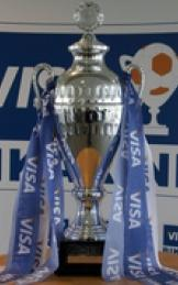 coppa d' Islanda